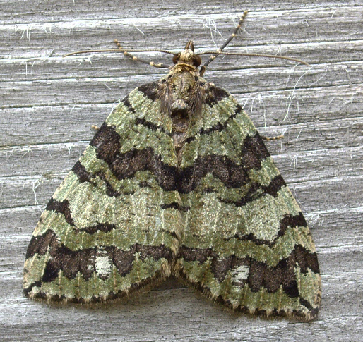 Hydriomena furcata - Germany: S Bayern, Sachenbach am Walchensee.